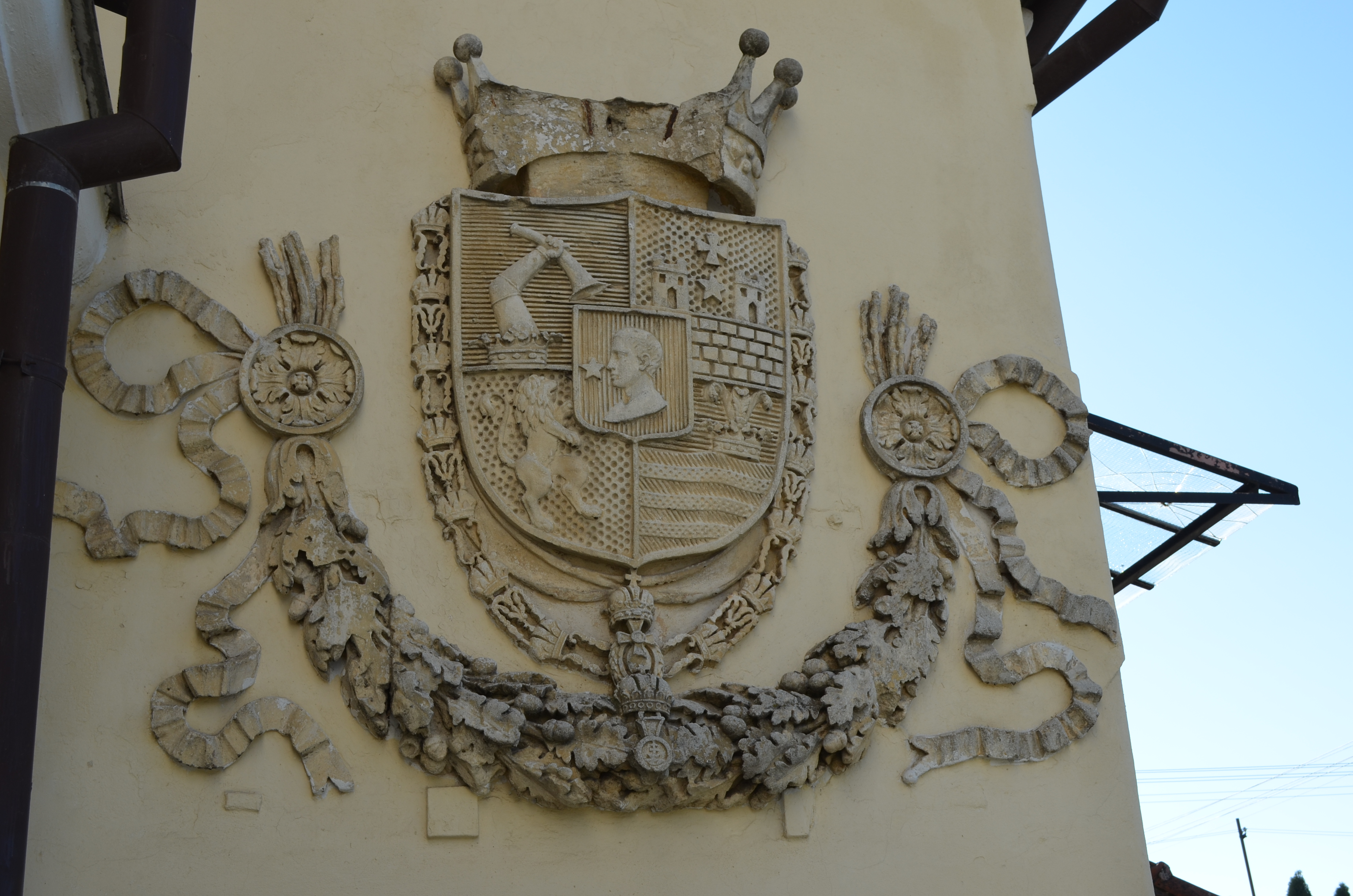 Appony